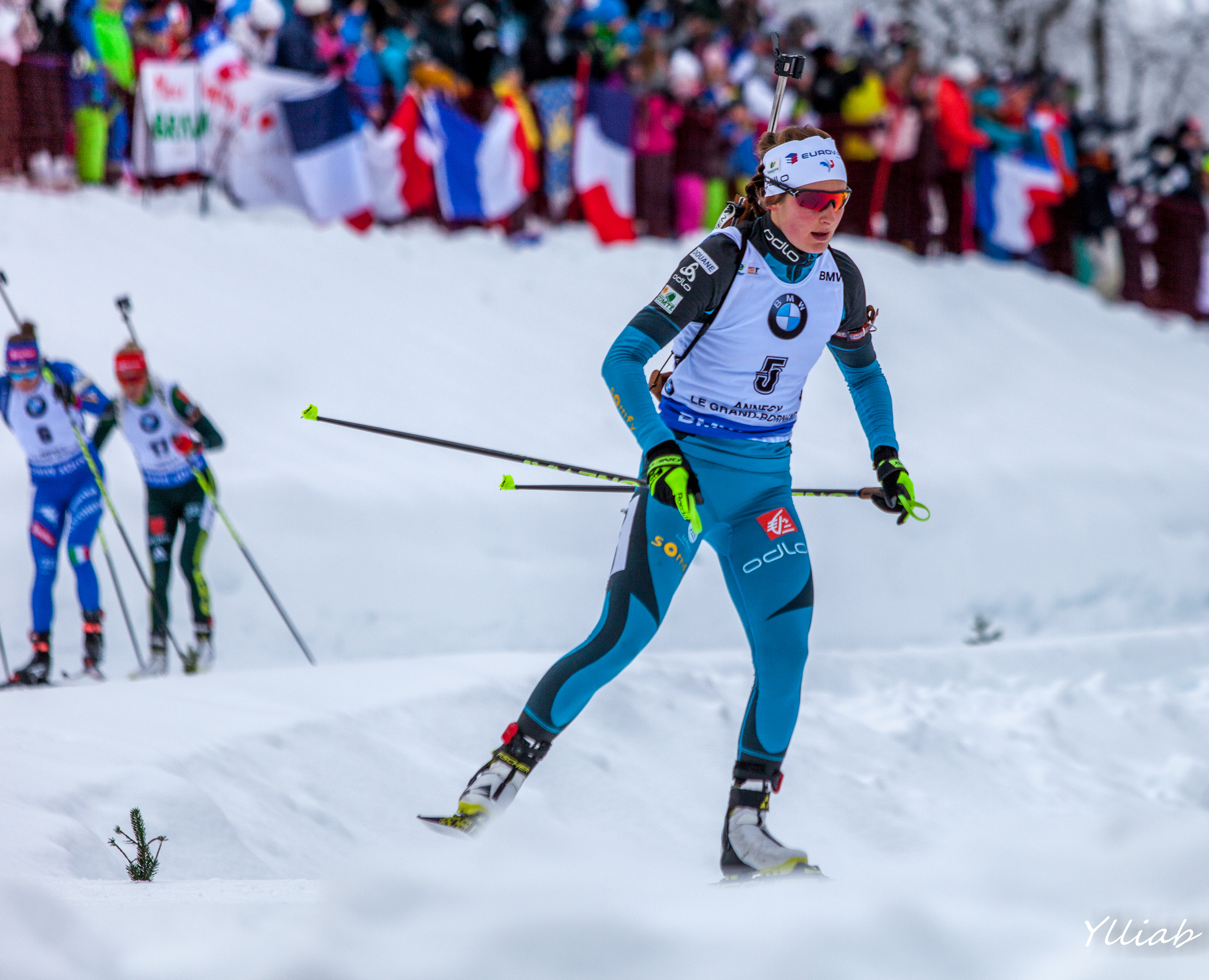 Biathlon Le Grand Bornand Decembre 2017